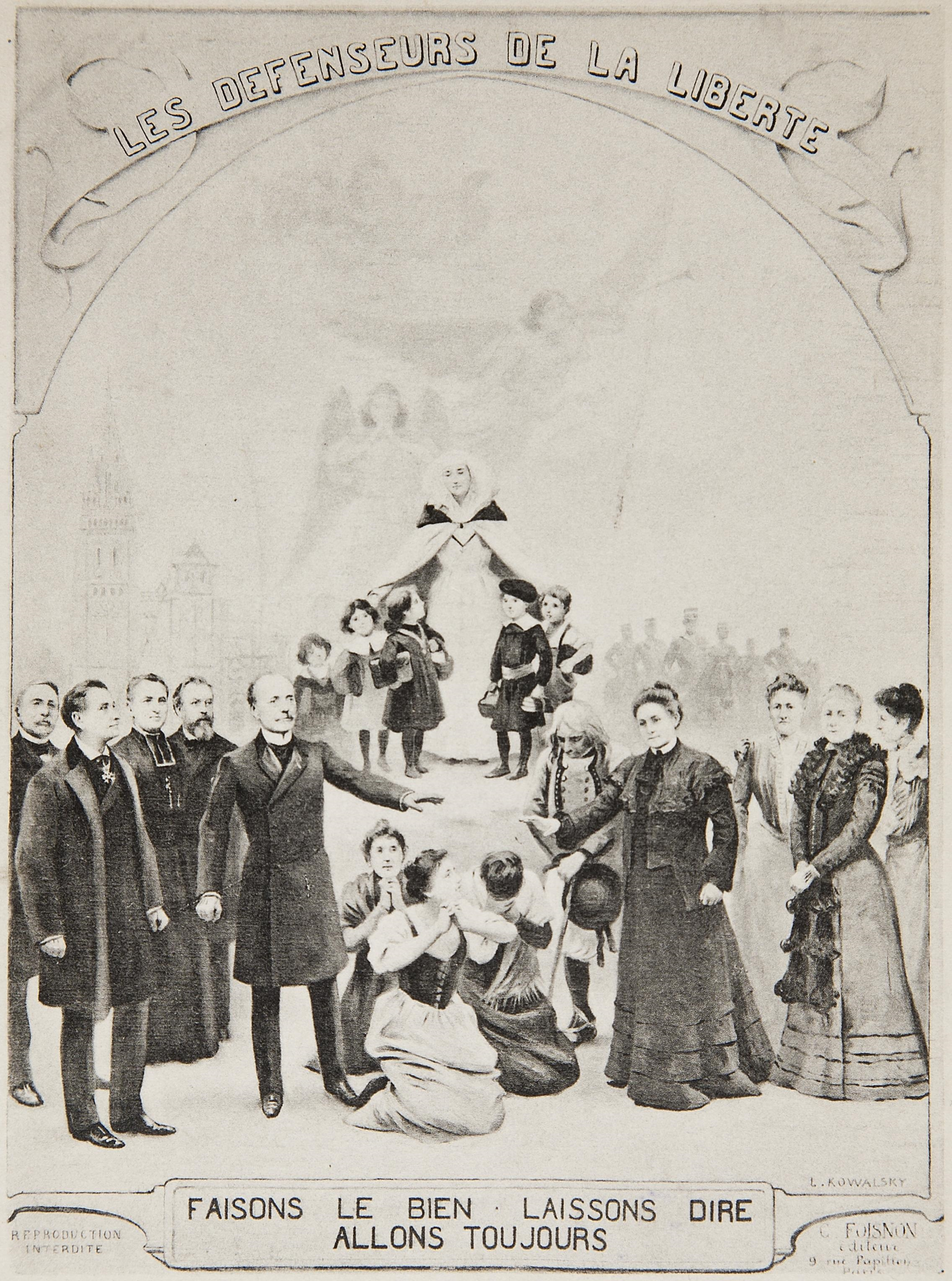 Carte postale éditée par Neurdein frères et reproduisant une affiche de L. Kowalsky : "Faisons le bien laissons dire allons toujours" : Au recto, sous un phylactère portant "Les défenseurs de la liberté", on voit une religieuse (une soeur blanche) prenant sous sa protection 5 jeunes enfants avec en arrière-plan, sur la gauche une église et sur la droite des militaires à cheval. Au premier plan, au centre trois femmes à genou et un Breton en costume debout; de part et d'autre - leurs noms étant légendés sur la marge inférieure - de gauche à droite :"Piou, l'abbé Gayraud, Lerolle, Fr.Coppée, Comte de Mun, Mme Piou, Mme Xavier Reille, la baronne René Reille, Mme Cibiel.En bas de ce tableau, une maxime encadrée "Faisons le bien . Laissons dire . Allons toujours ".